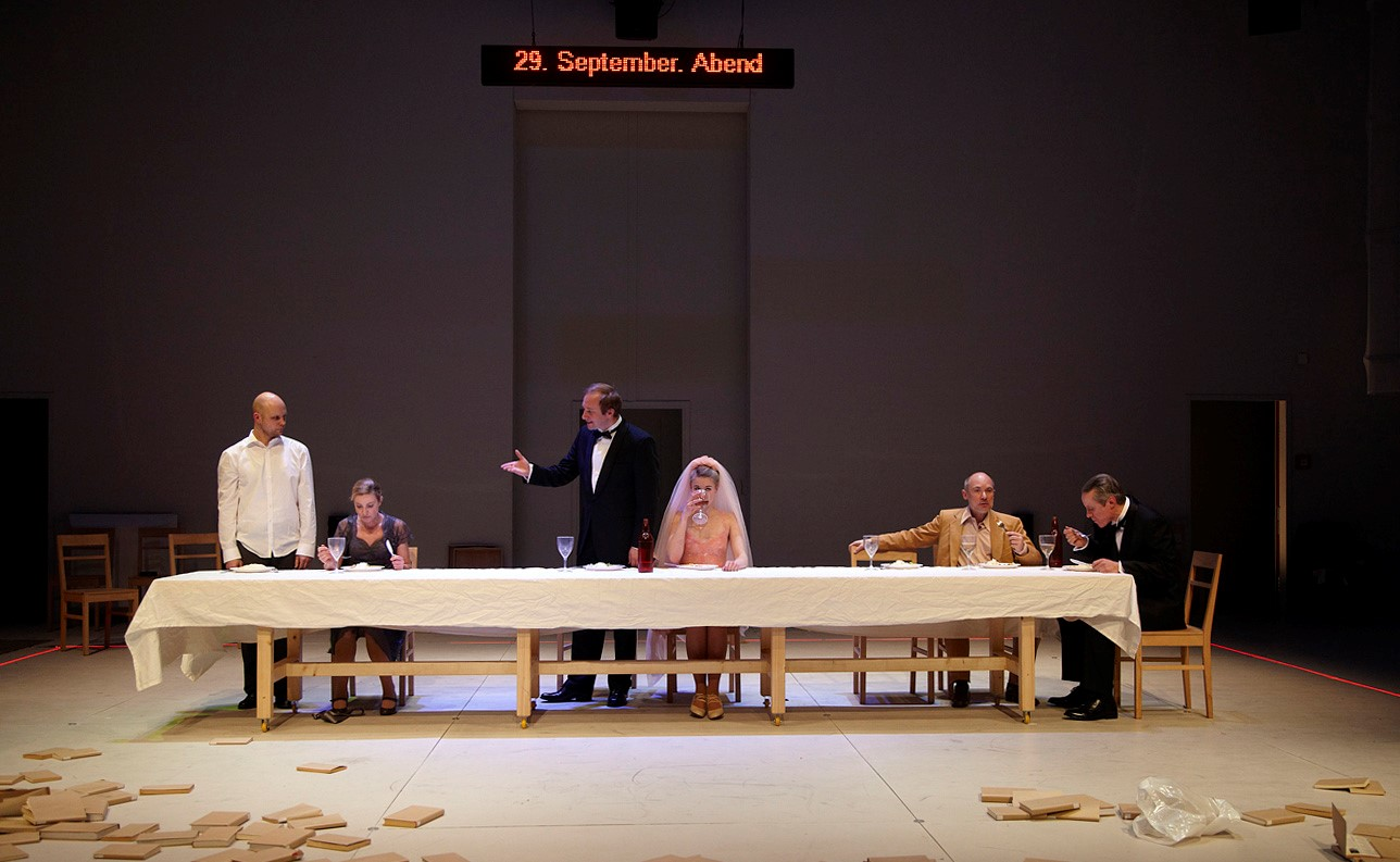 "ג'ונגל הכרך" מאת ברכט, בימוי אופירה הניג, עיצוב במה ותלבושות מרים גורצקי בילו, תיאטרון שטאטטיאטר אאוגסבורג גרמניה, 2013